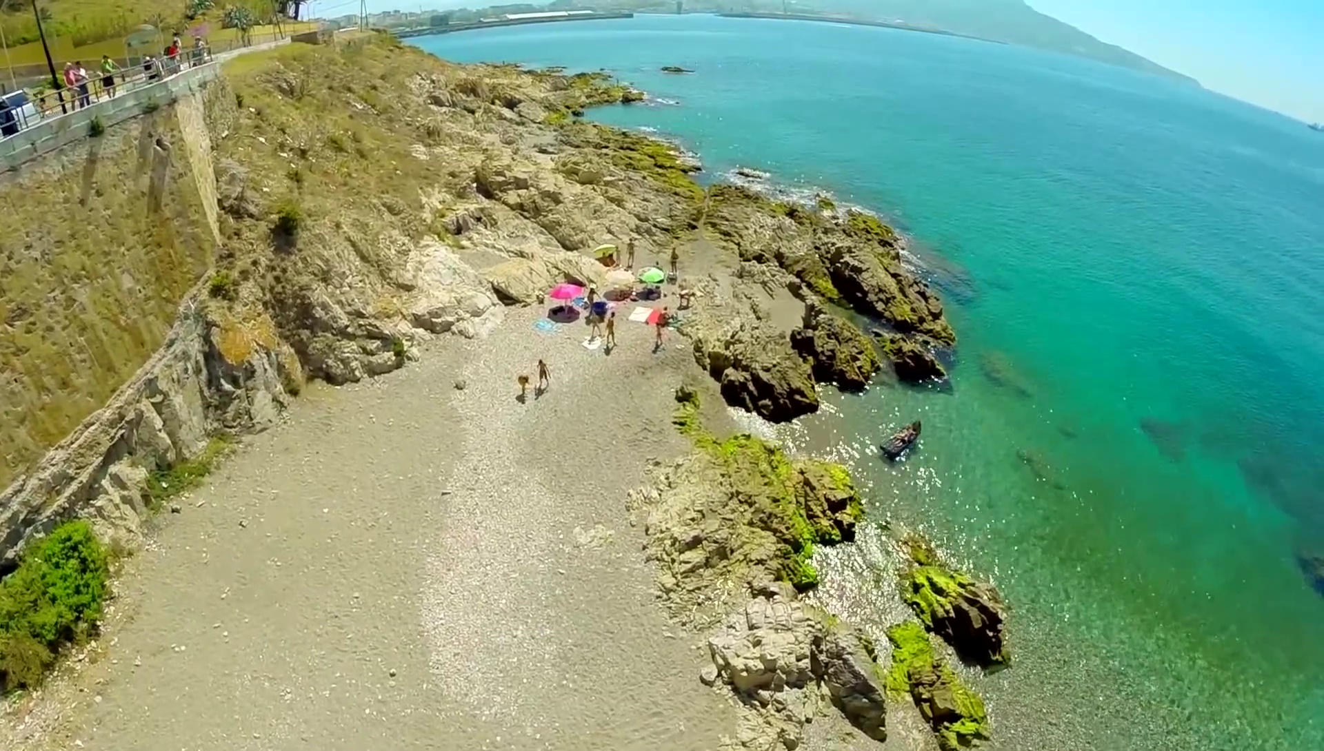 Playa de San Amaro